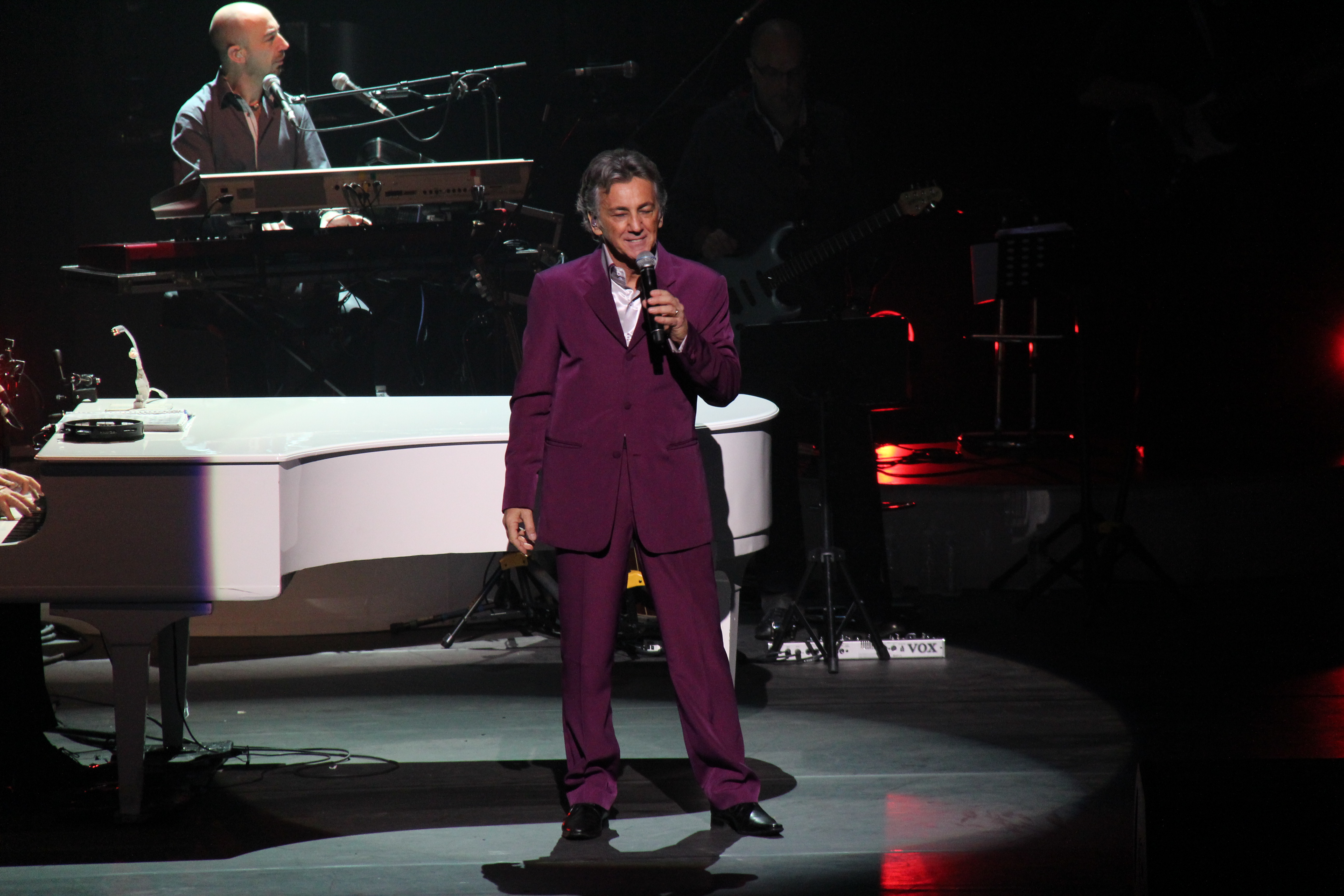 Jean Pierre Savelli Chantant à Age Tendre